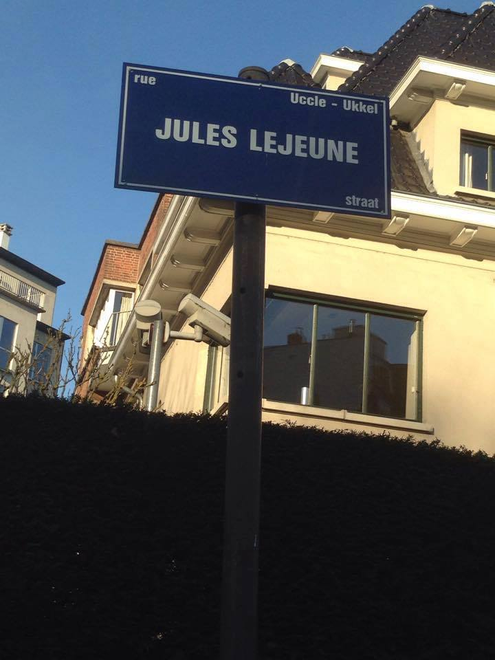 Rue Jules Le Jeune, Uccle